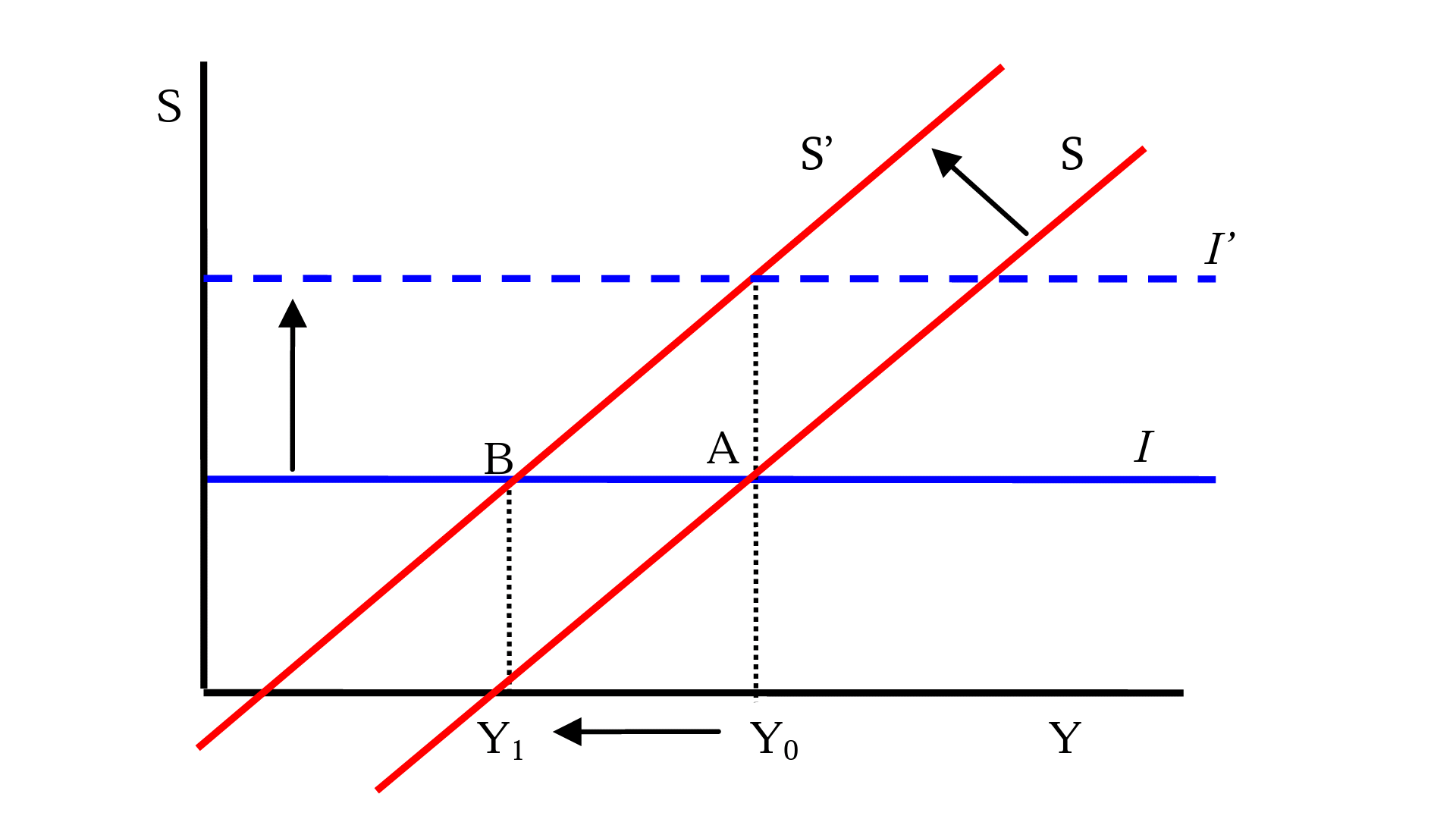 Խնայողությունների պարադոքս